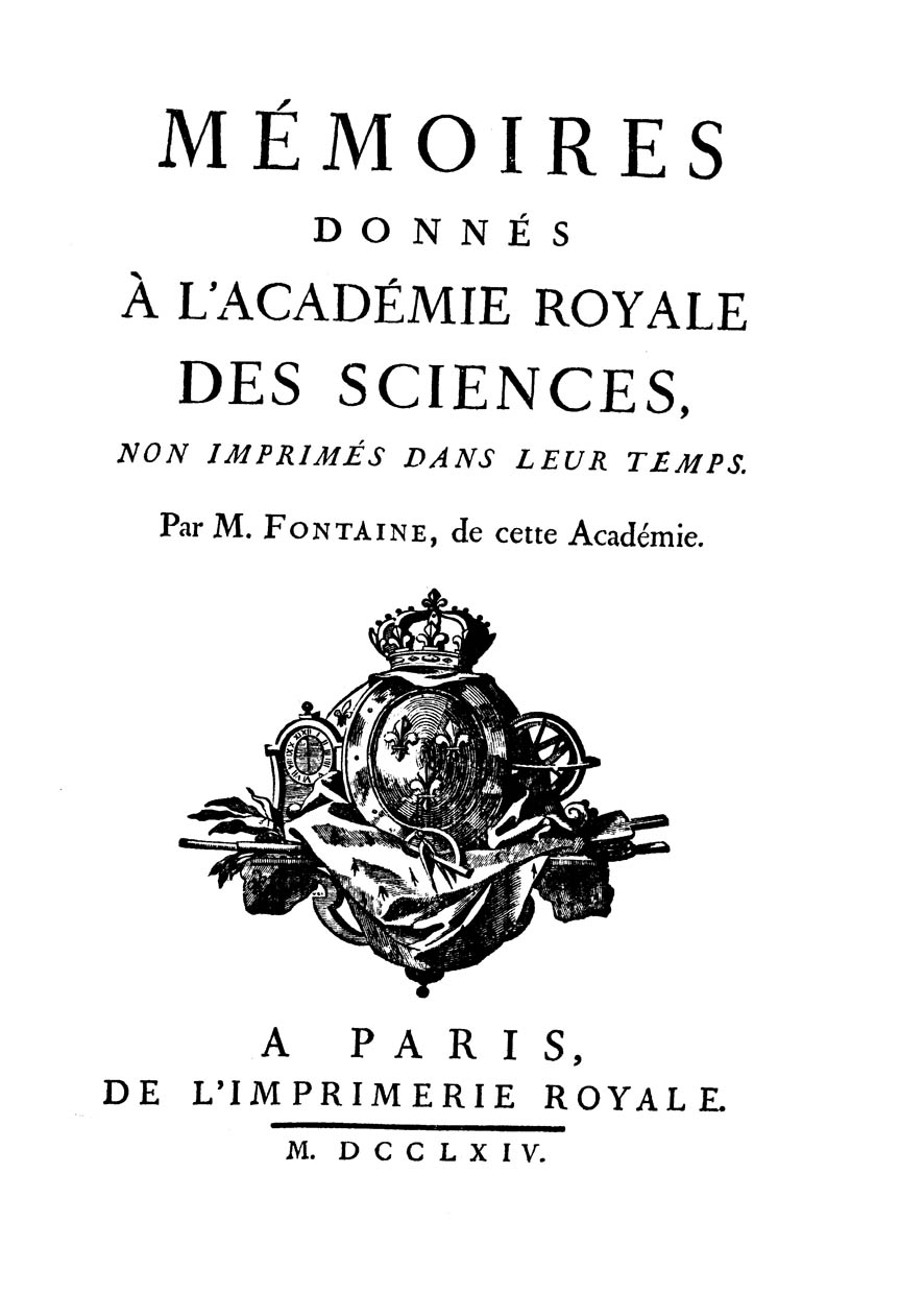 Frontespizio